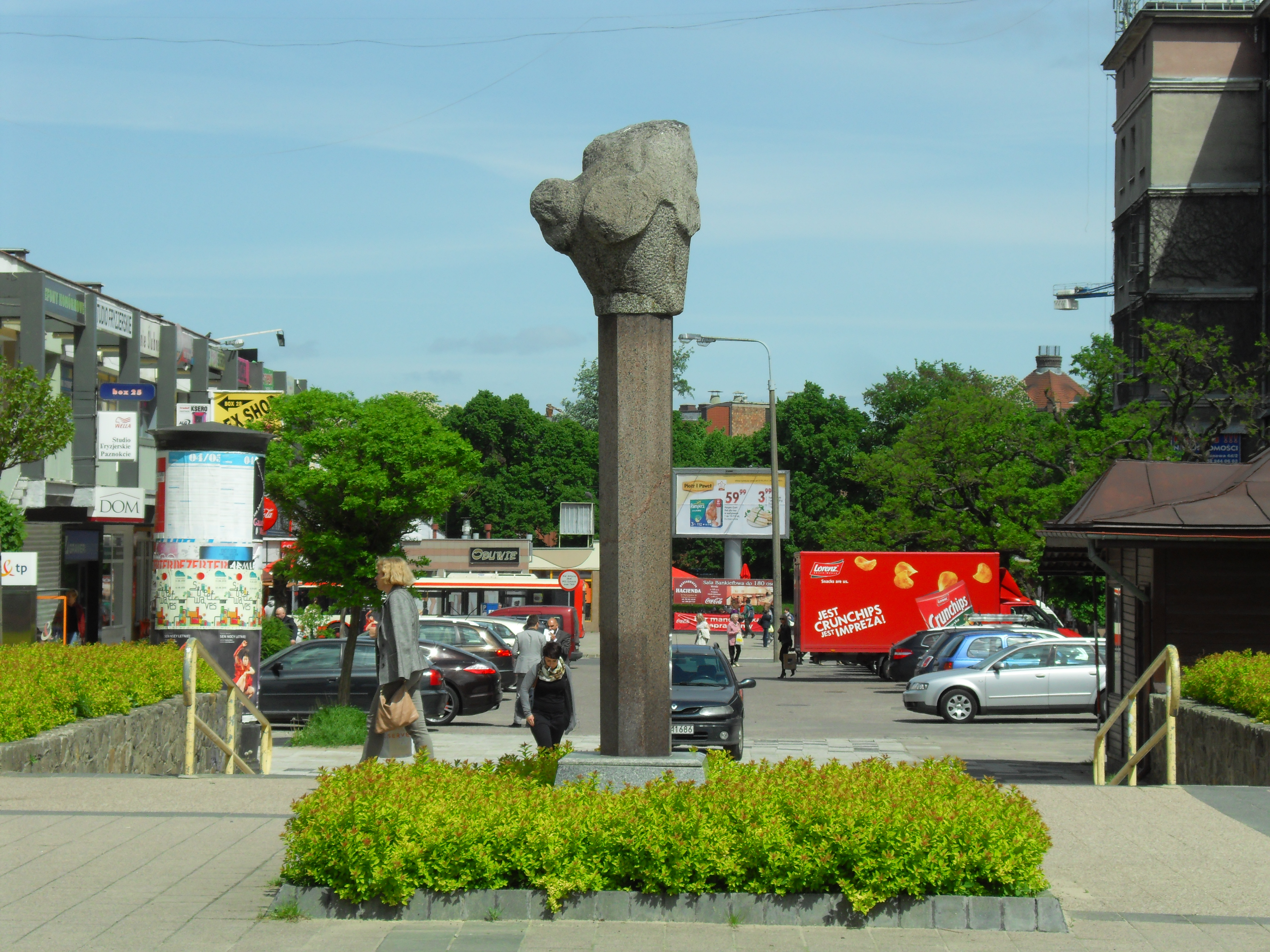 Gdańsk Wrzeszcz Górny, ul. Klonowa. Pomnik "Legenda Norwidowi", autor Alfons Łosowski.